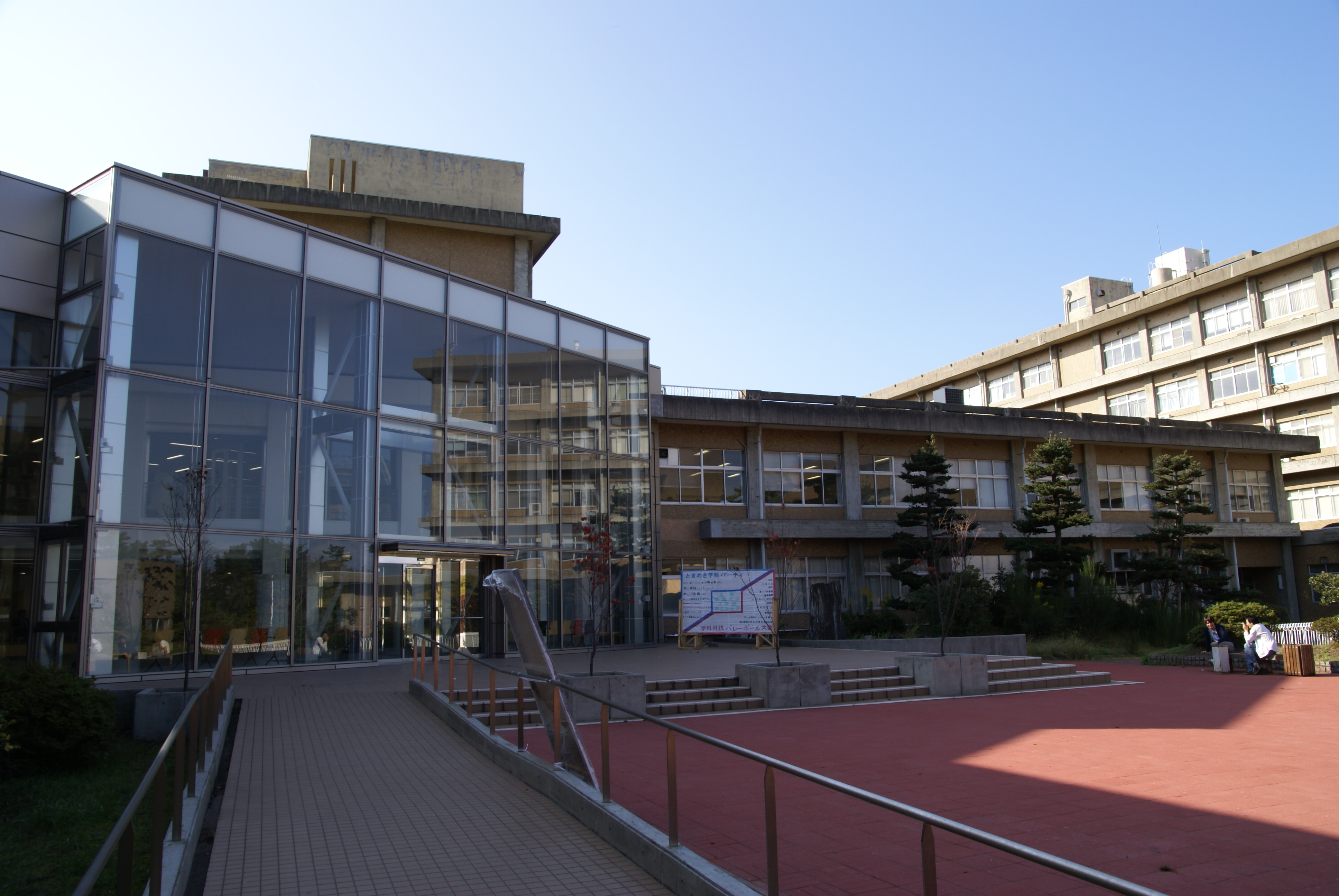 新潟大学工学部